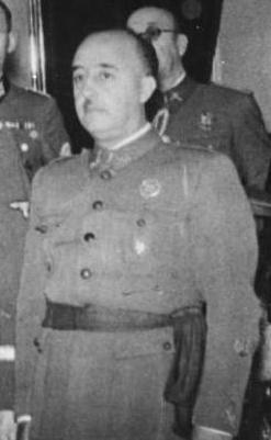 Detalle de una fotografía que muestra al general Franco en 1940